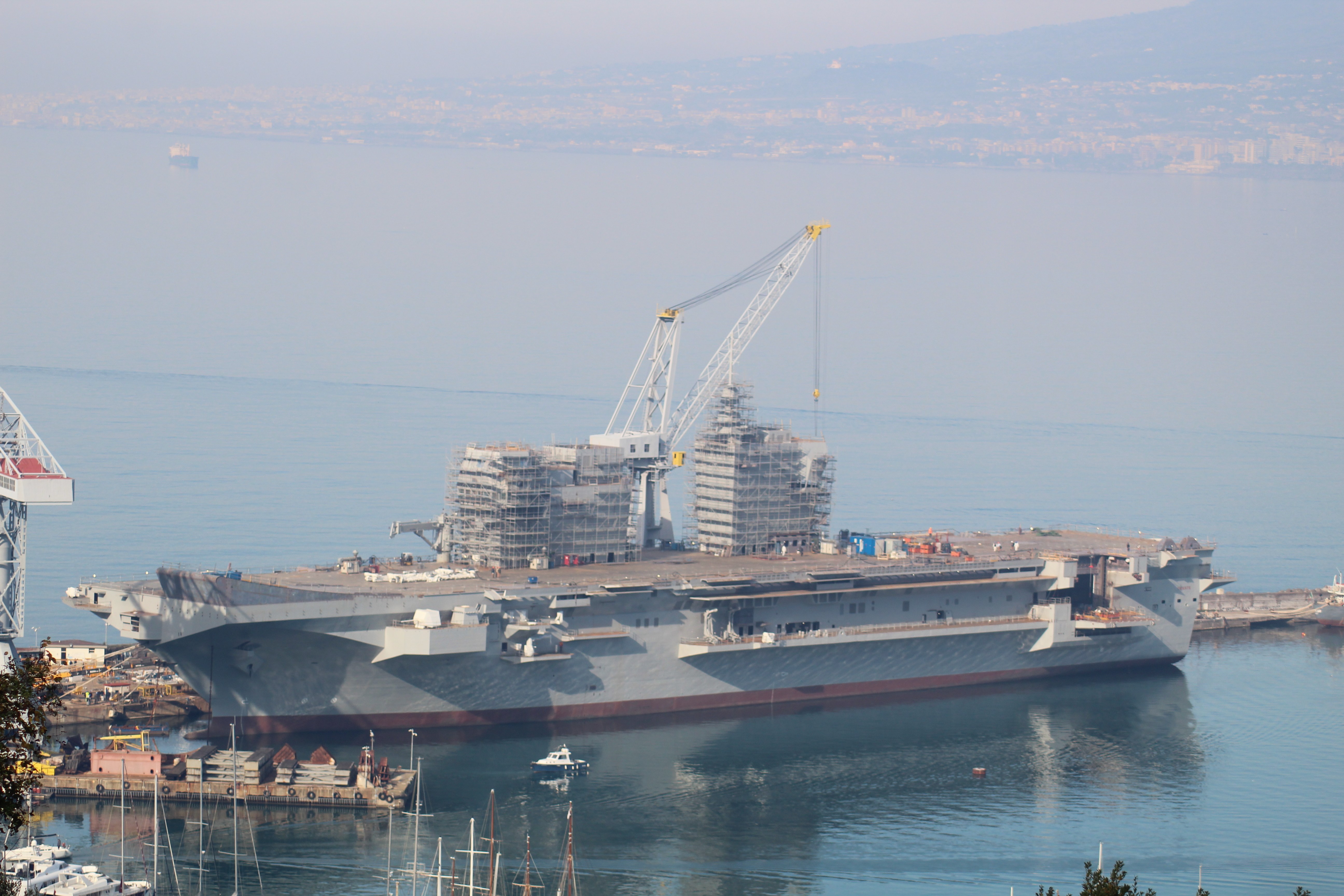 La nave ormeggiata alla banchina allestimento dello stabilimento Fincantieri di Castellammare di Stabia - Foto Ivan Guida